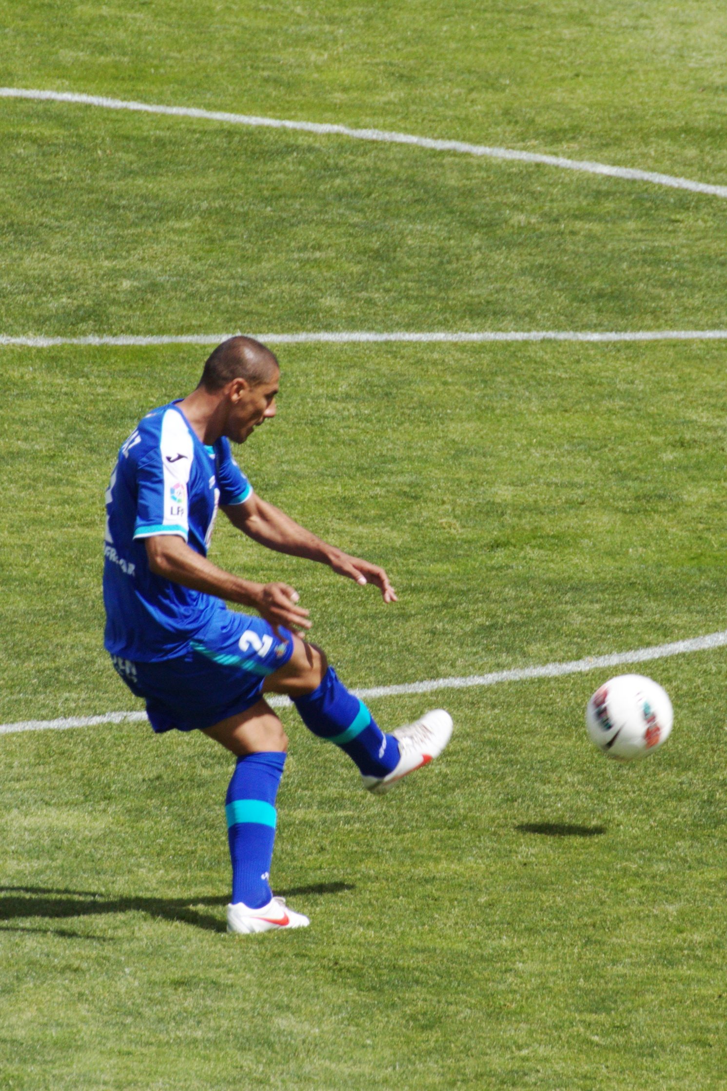 Daniel Alberto Díaz, mejor conocido como El Cata Díaz como jugador del Getafe Club de Fútbol